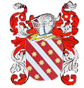 Foto montagem do brasão dos Paes de Barros Penteados